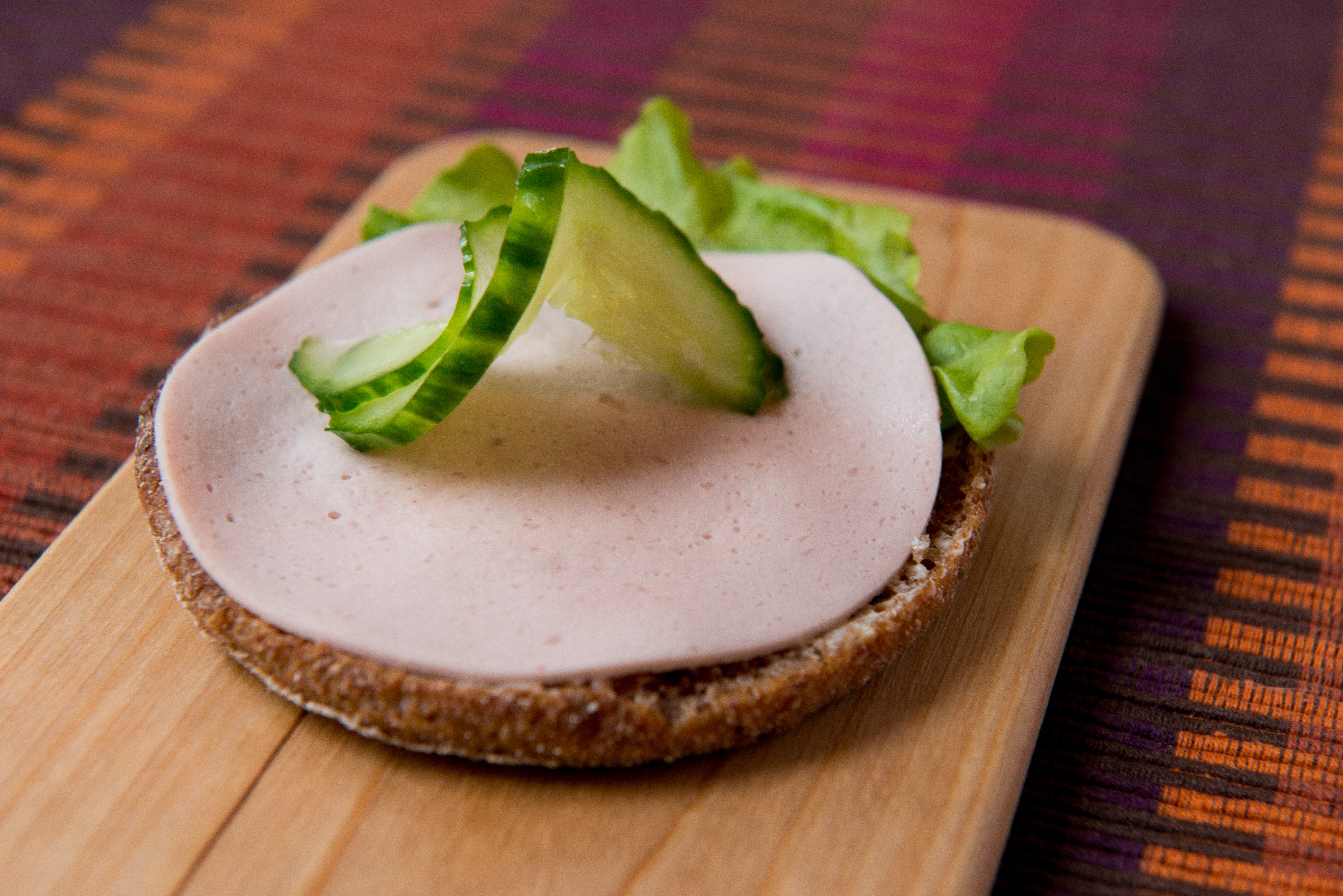 Lauantaimakkaravoileipä